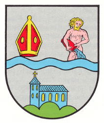 Wappen von Theisbergstegen